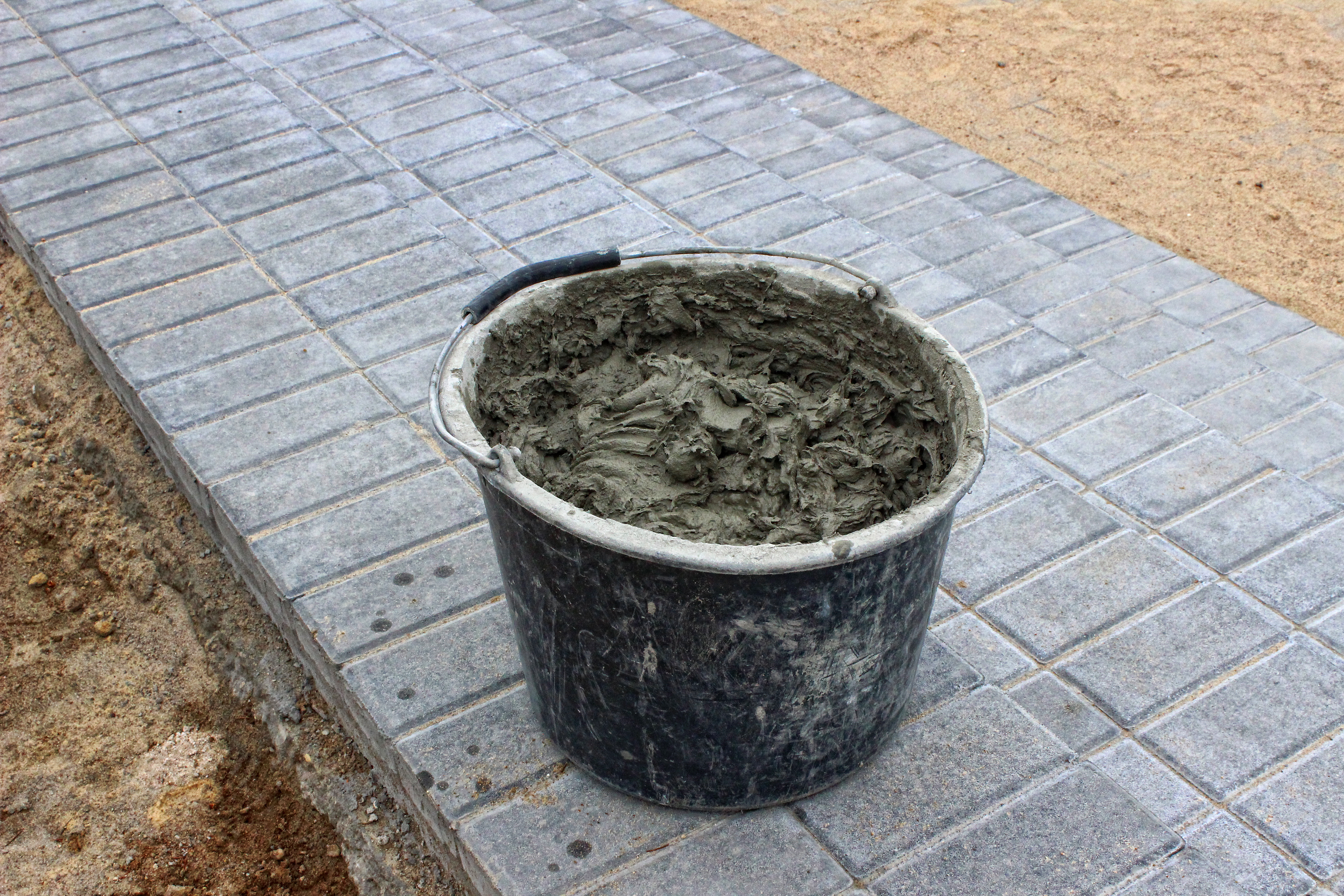 Wiadro z zaprawa murarska